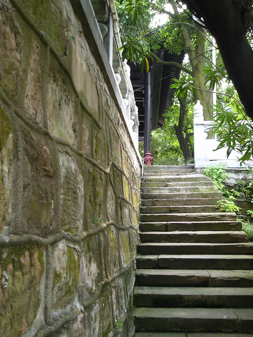 书院一角处